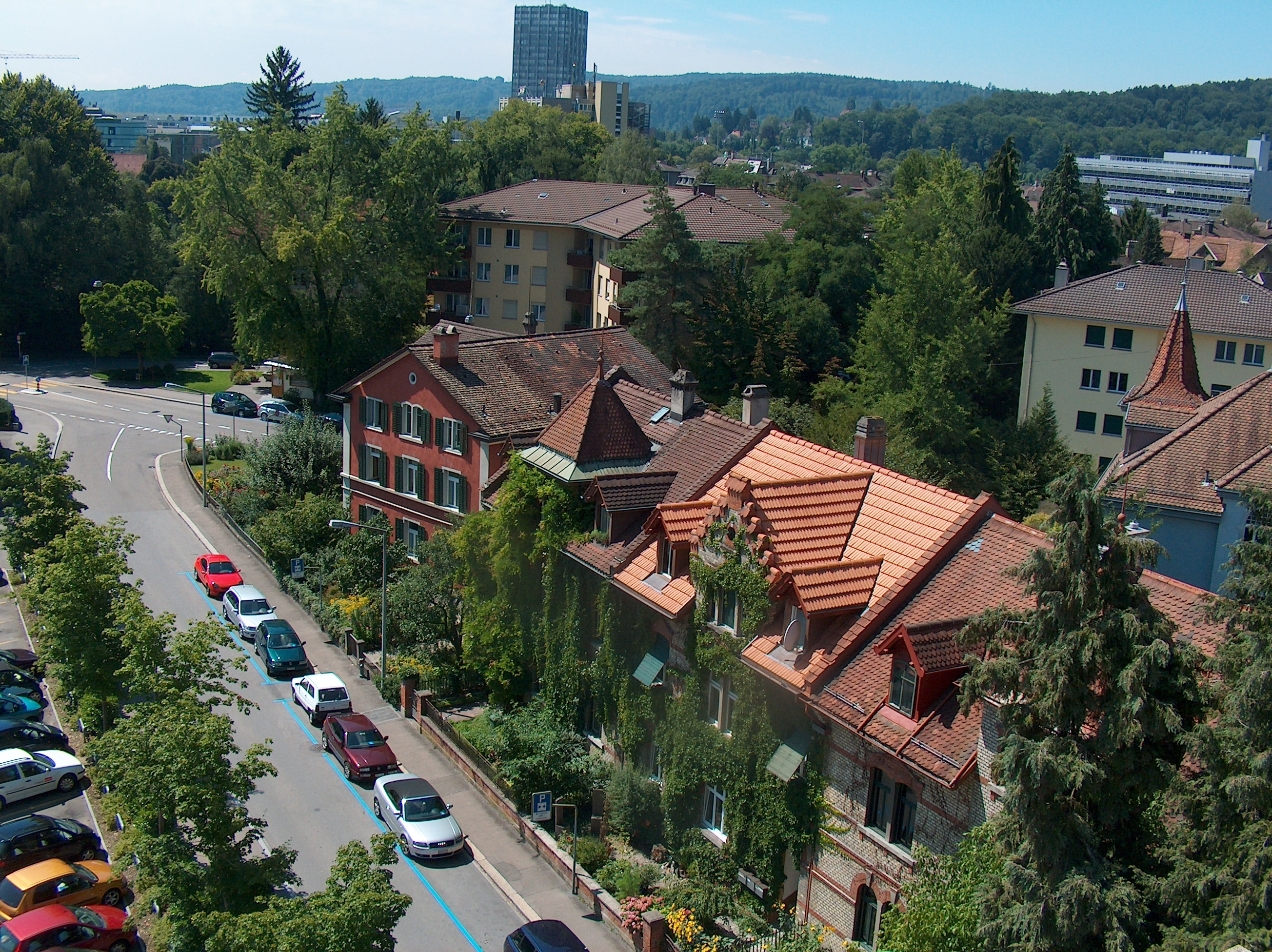 Winterthur Brunngasse Fotografiert am 10.08.2005 Das Foto steht unter freier GNU-Lizenz